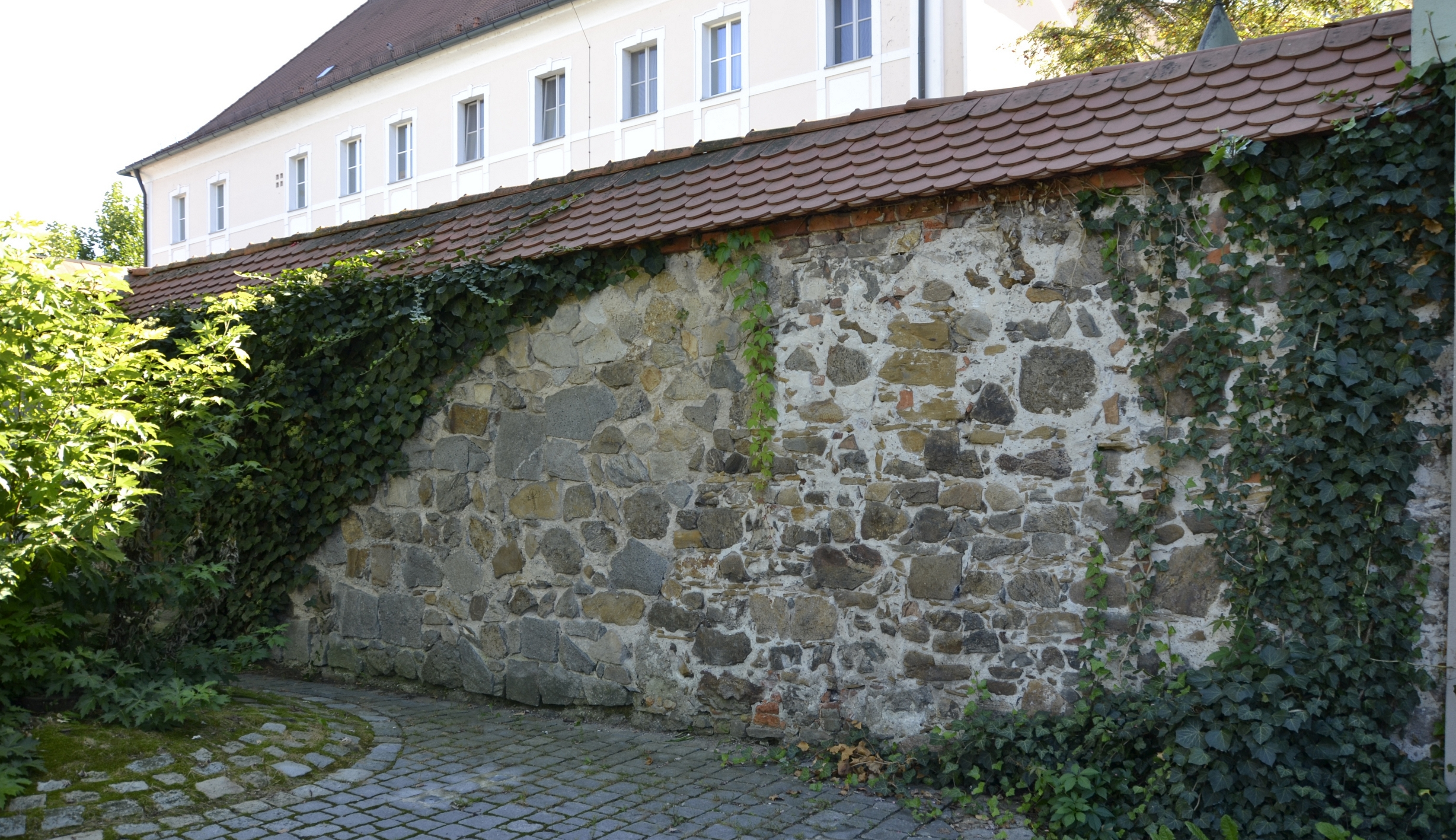 Reste der mittelalterlichen Stadtmauer von Vilshofen an der Donau.